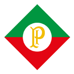 Logo oficial do Cruzeiro Esporte Clube 1921